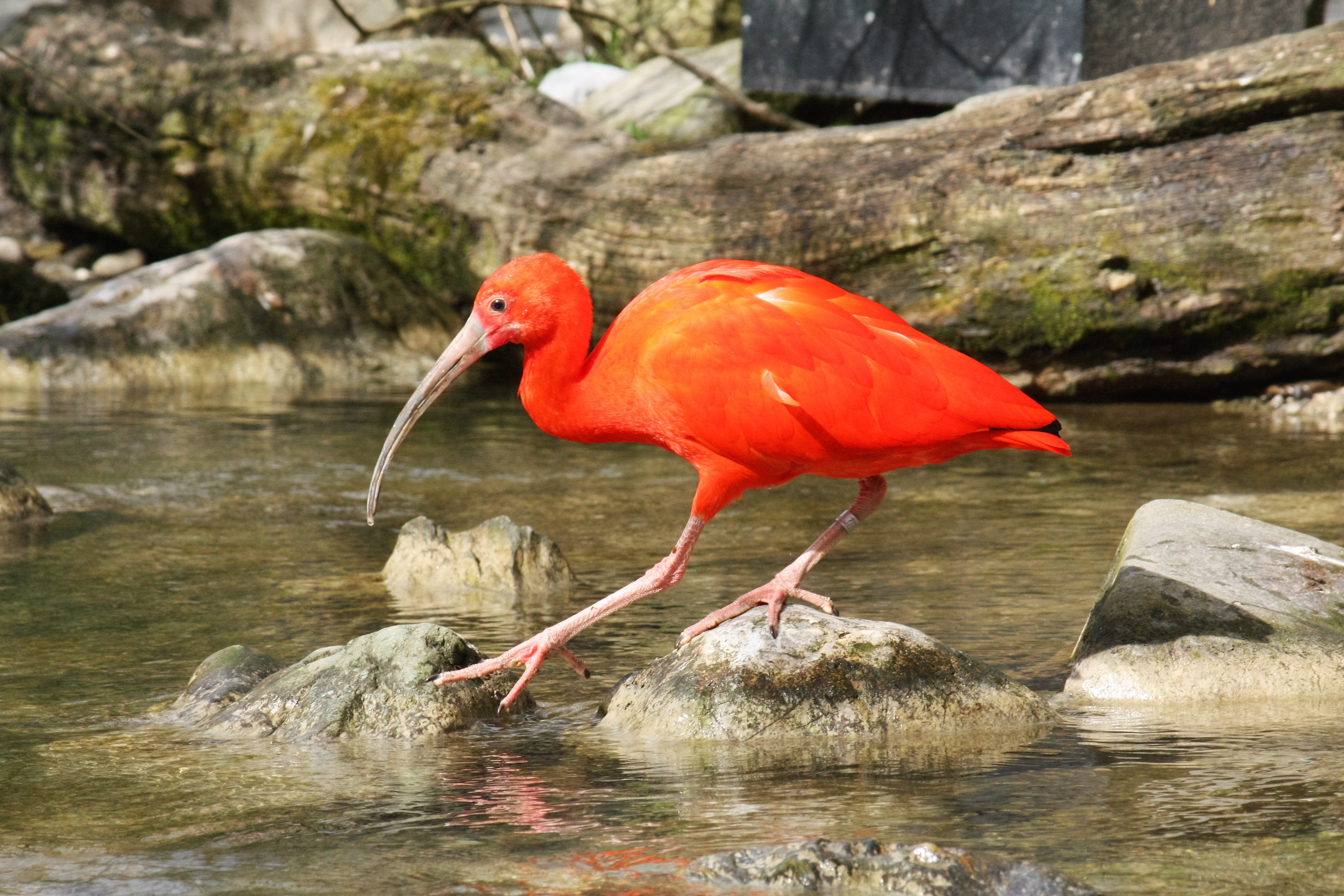 Scharlachsichler im Zoo Hellabrunn